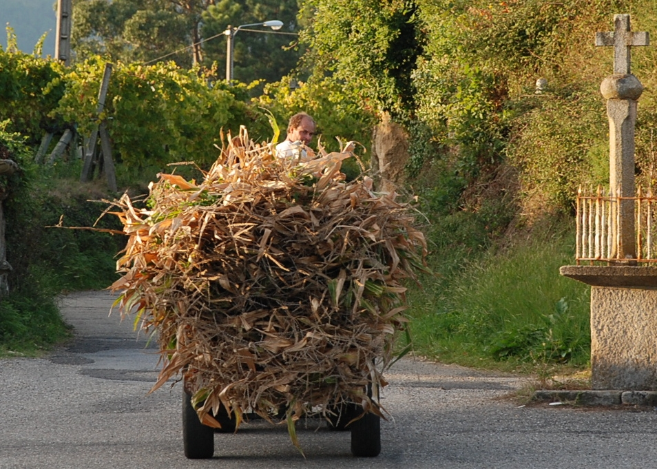 cosecha